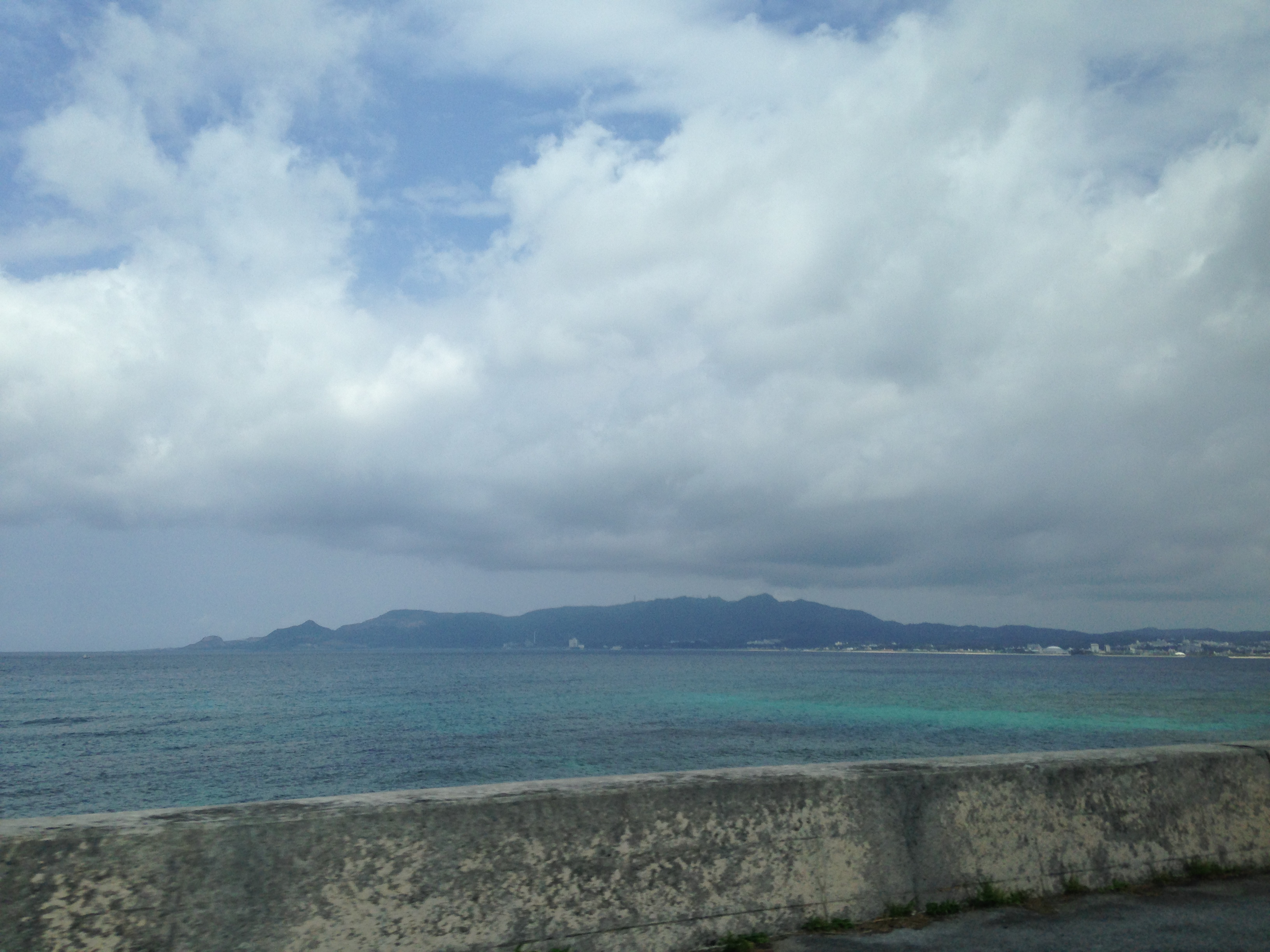 名護市許田IC北側の国道58号より望む名護湾と本部半島